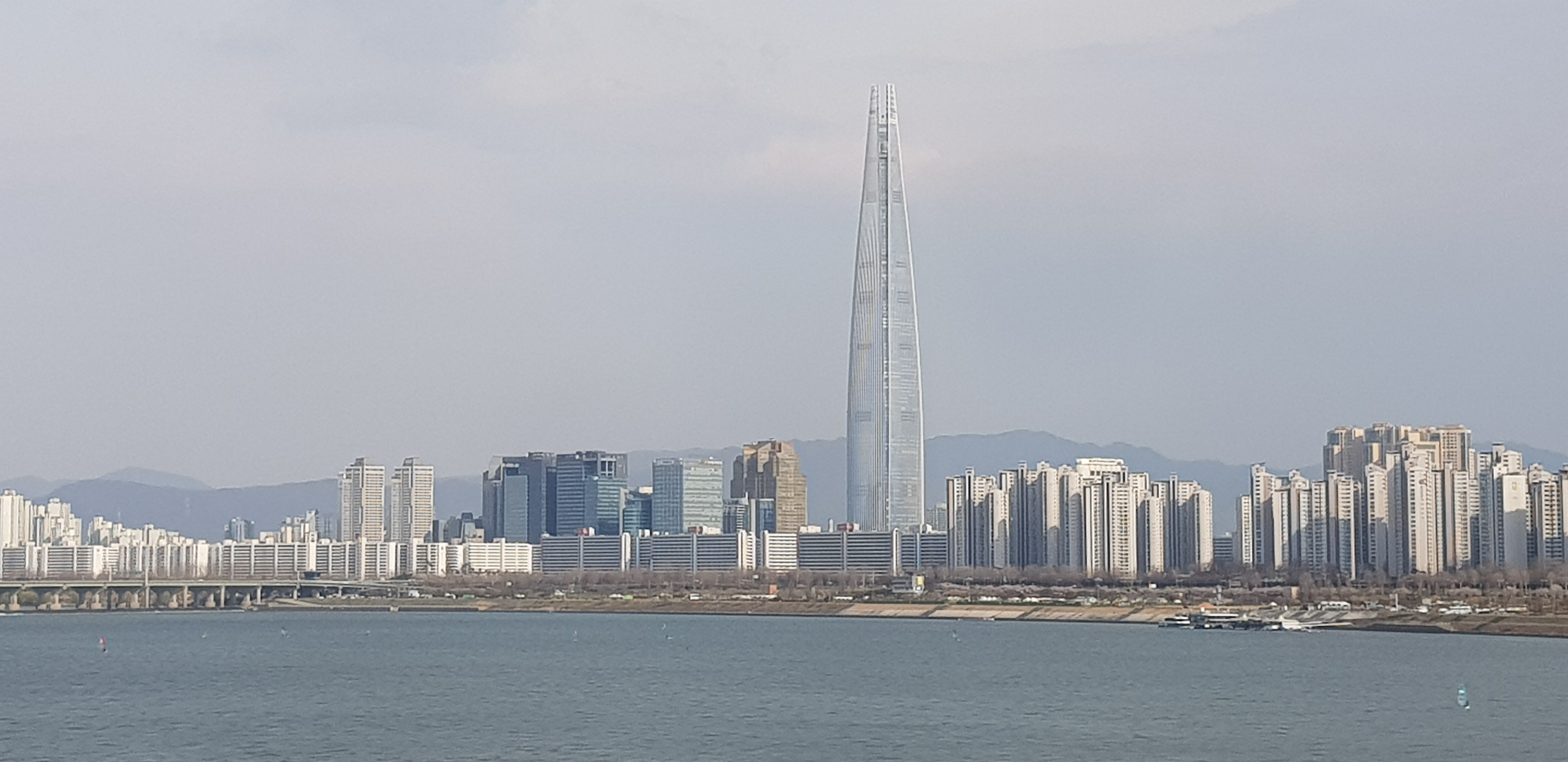 청담대교를 달리는 7호선 열차 안에서 촬영한 롯데월드타워의 모습입니다.